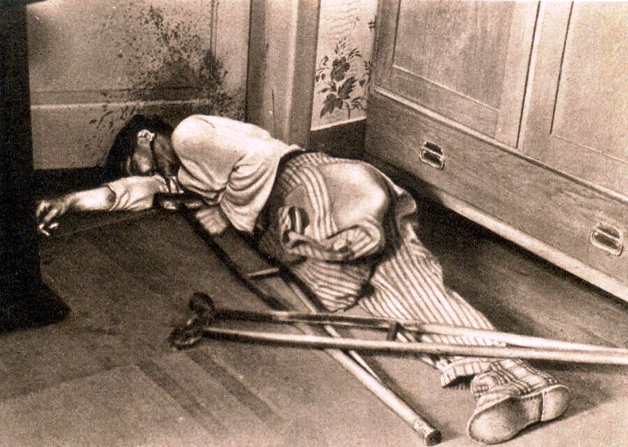 Invalid Rebolj Martin, ustreljen. Zločin je izvršila Črna roka 14.10.1944 na Ježiču